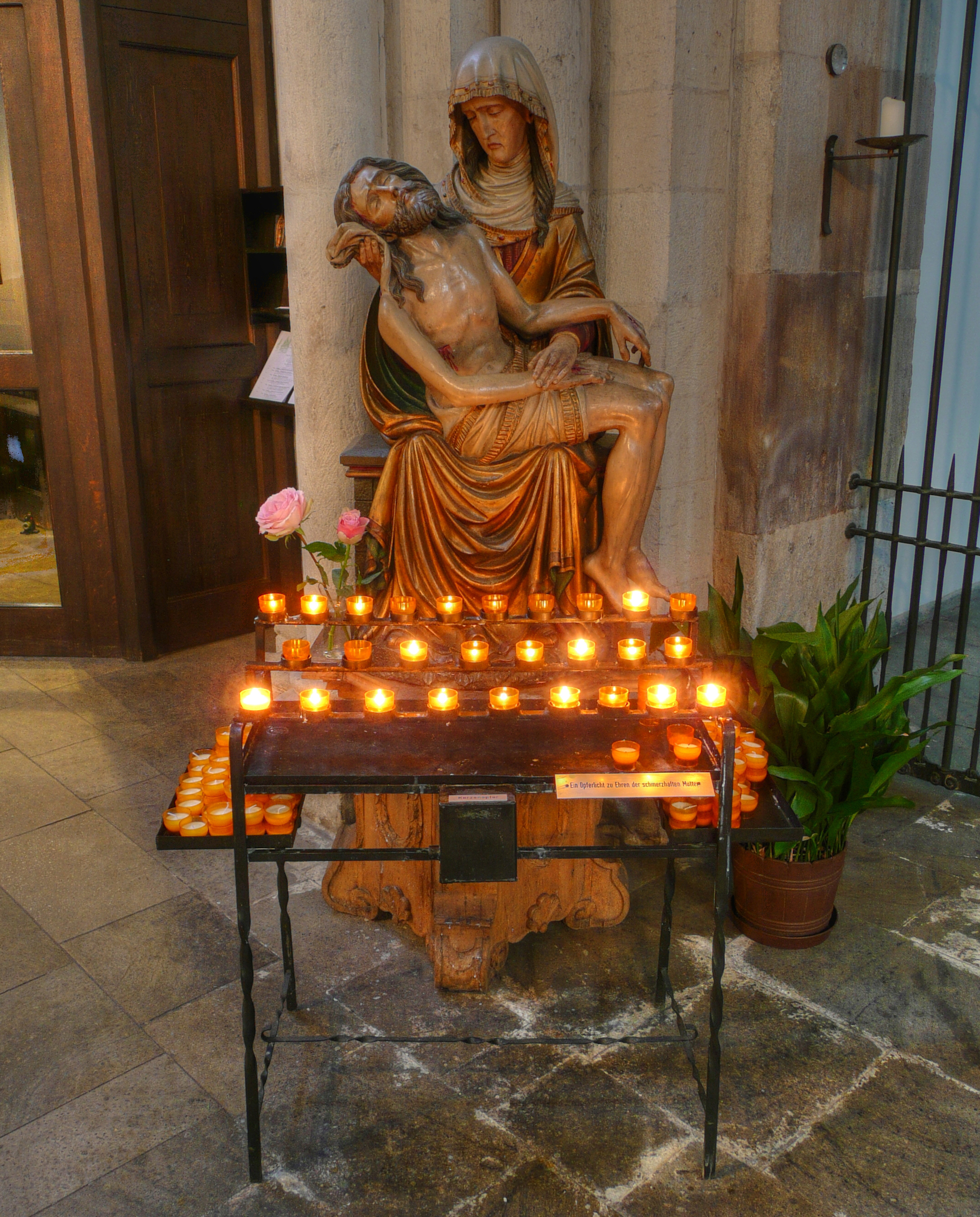 Pietà in der Kölner Kirche St. Aposteln)